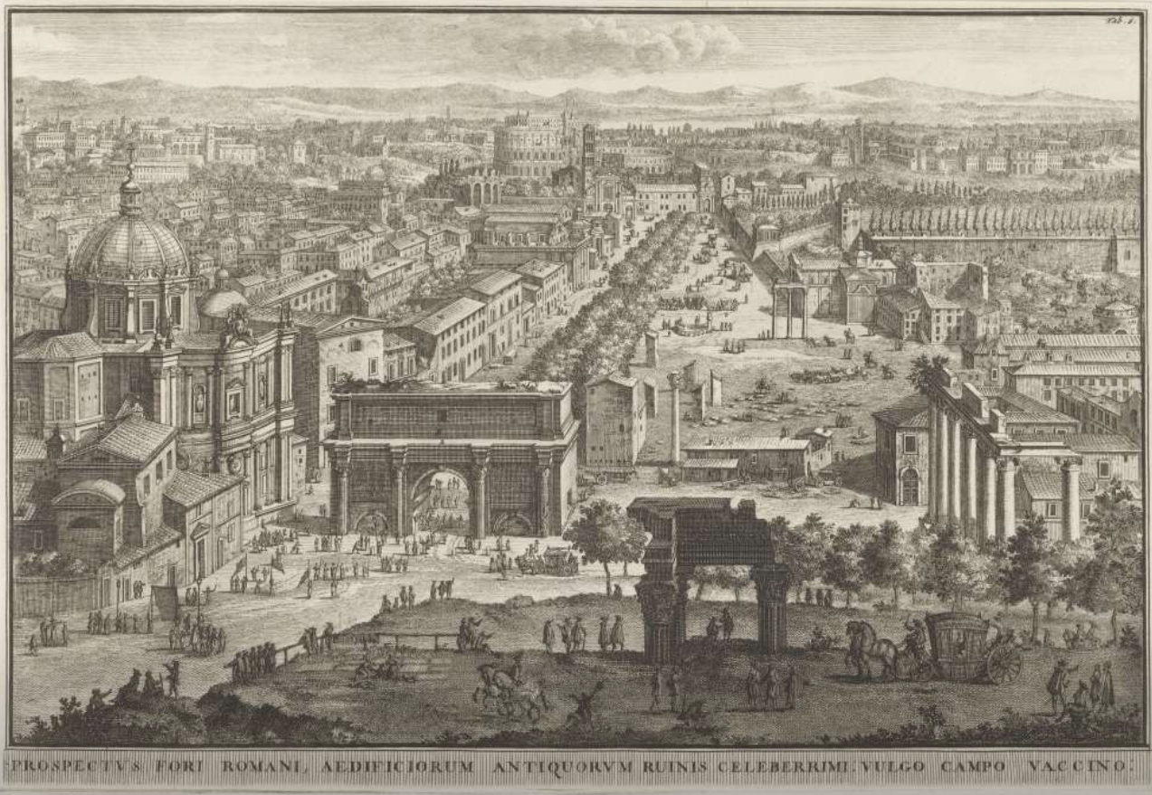 Foro Romano, Jacobus Baptist (Lieven Cruyl)